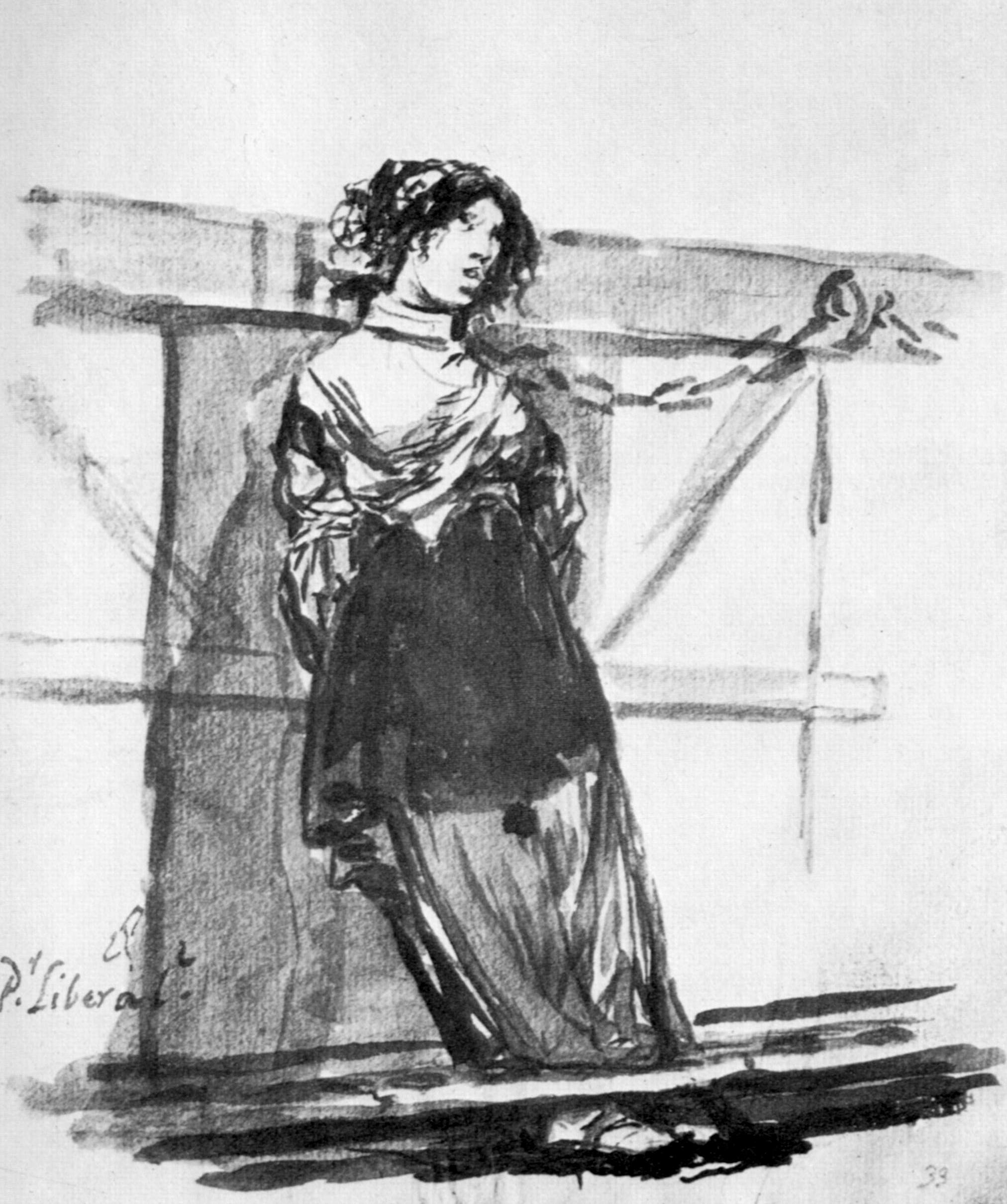 Madrid, Museo Nacional del Prado, D 4074. (Gassier C.98 [243]) 20,5 × 14,2 cm Pincel y sepia sobre papel (véanse los datos en )